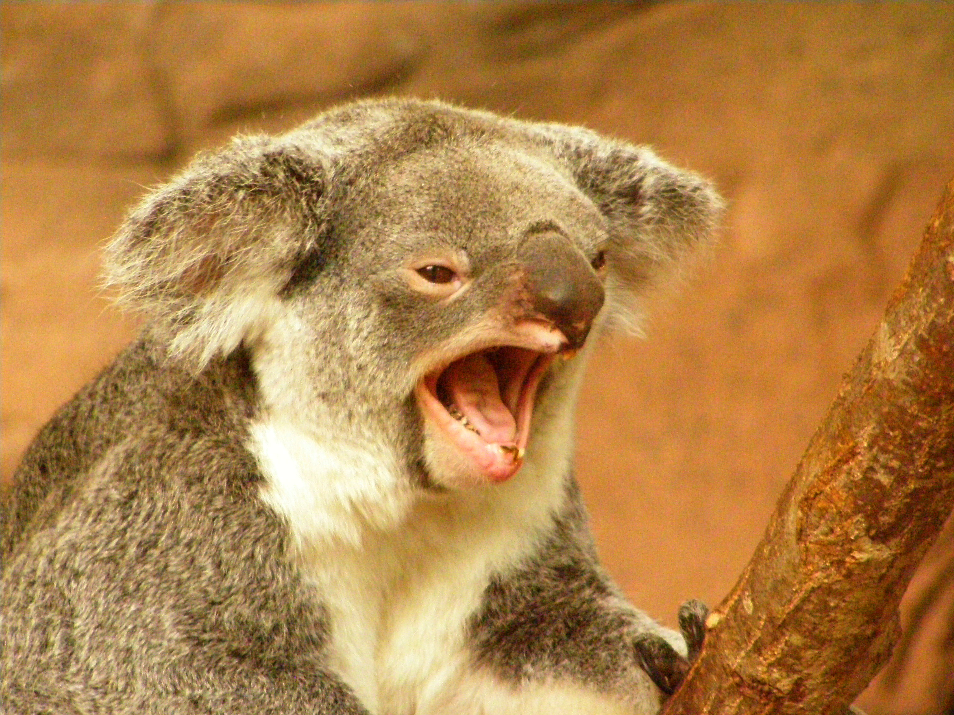 Koala, ZooParc de Beauval, Saint-Aignan, Loir-et-Cher, France